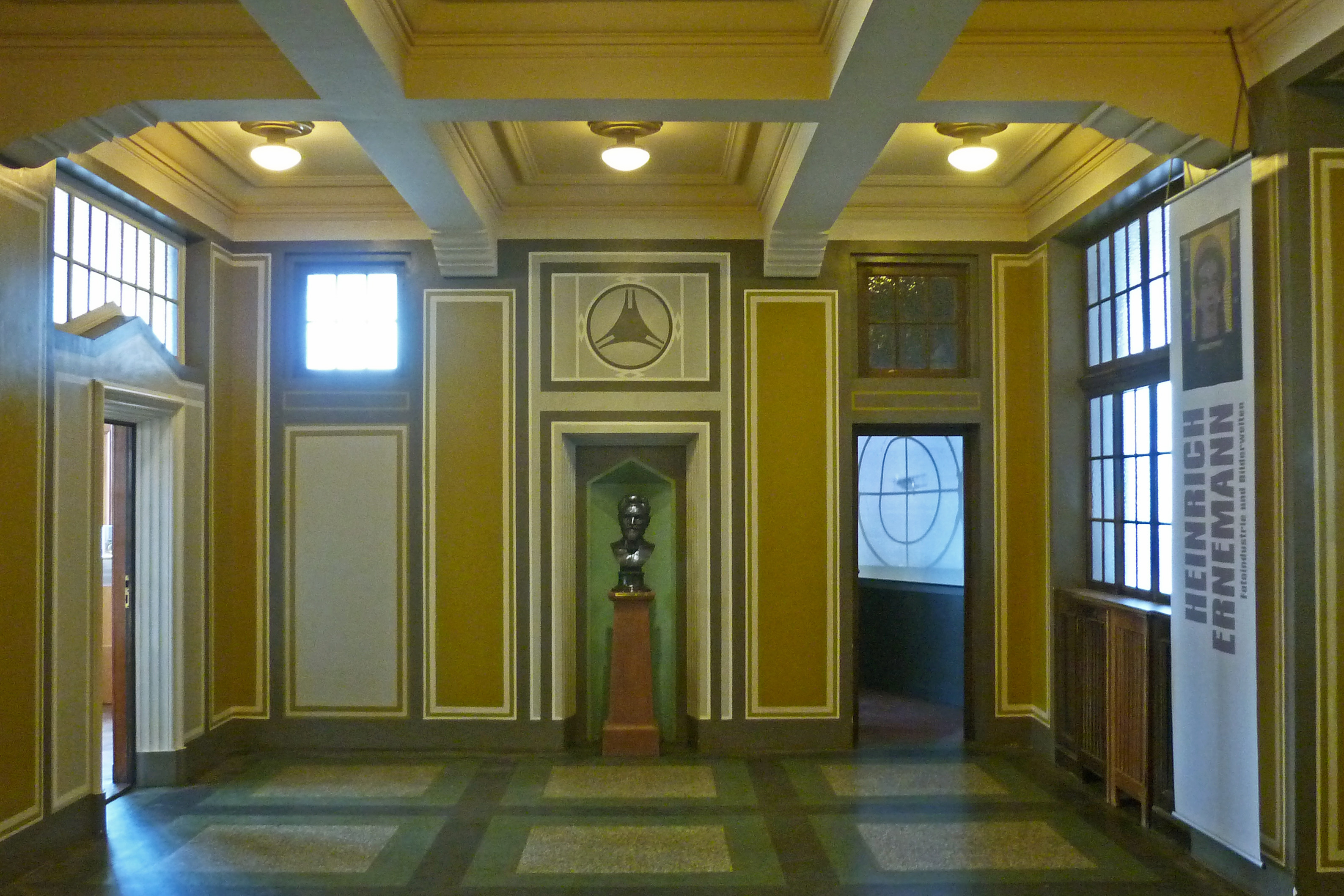 Technische Sammlungen Dresden: Foyer mit Ernemann-Büste